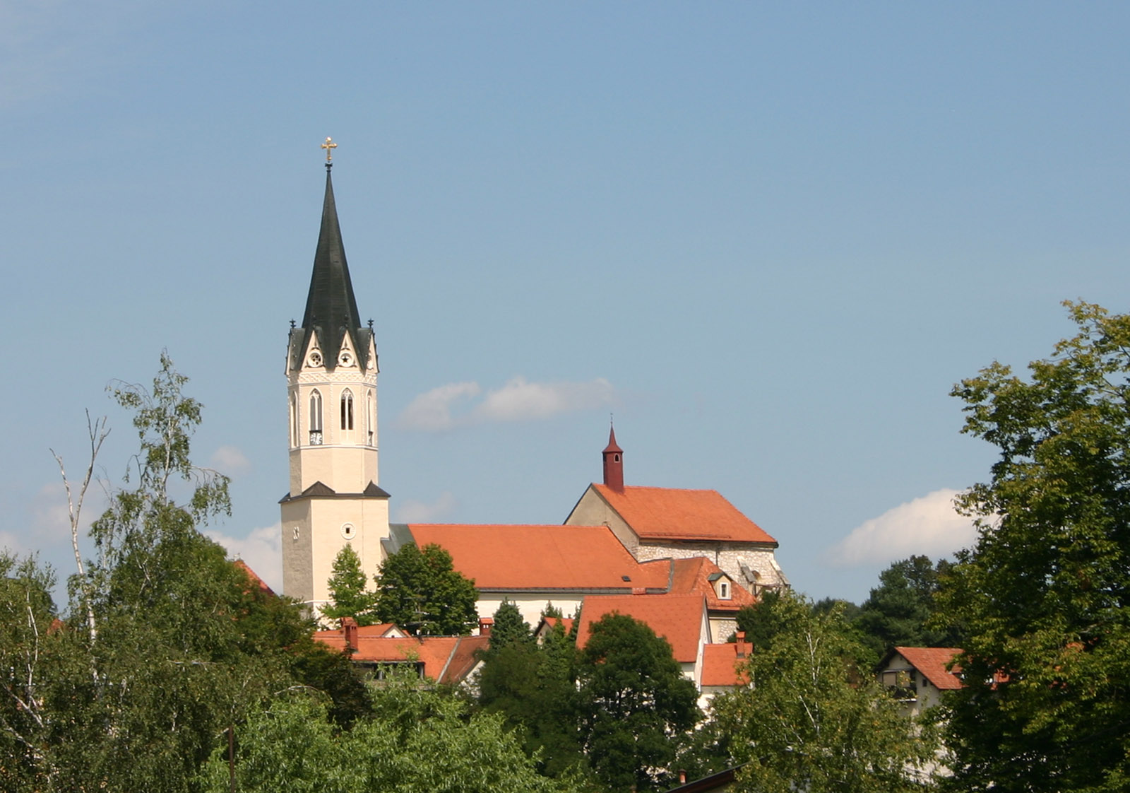 Kapiteljska cerkev sv. Miklavža